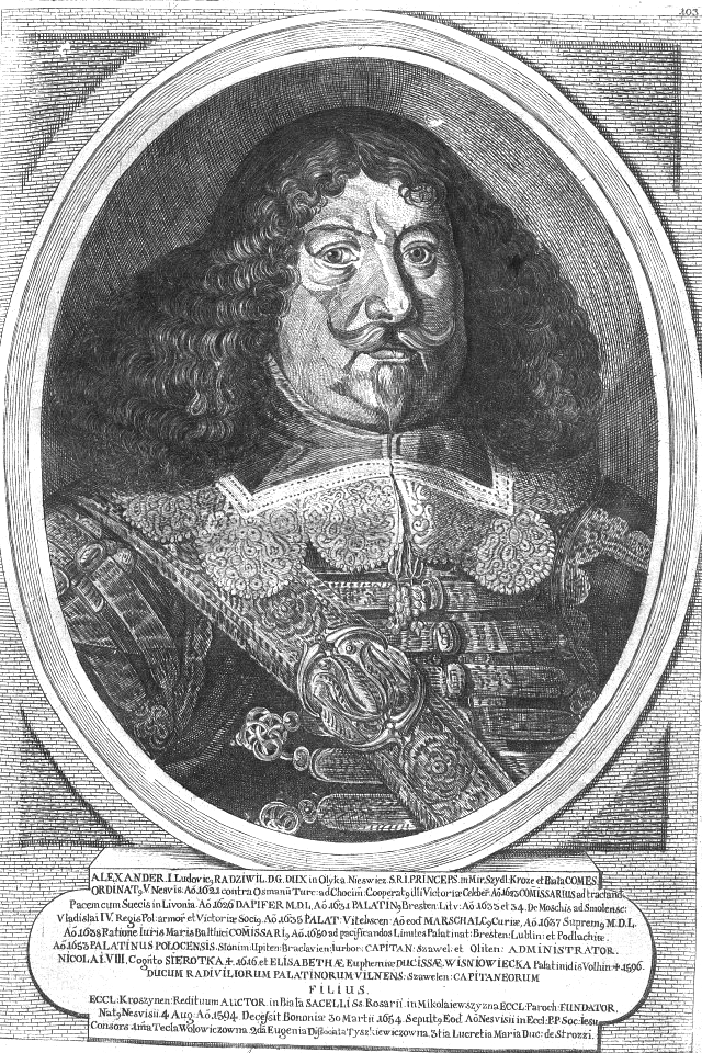 Aleksander Ludwk Radziwiłł